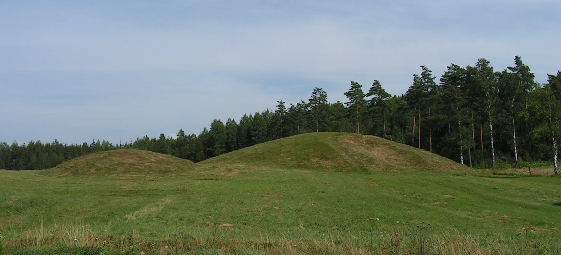 Gröne hög som tillhör Blomsholms ägor norr om Strömstad ligger vid Värmlandsbro strax intill E6